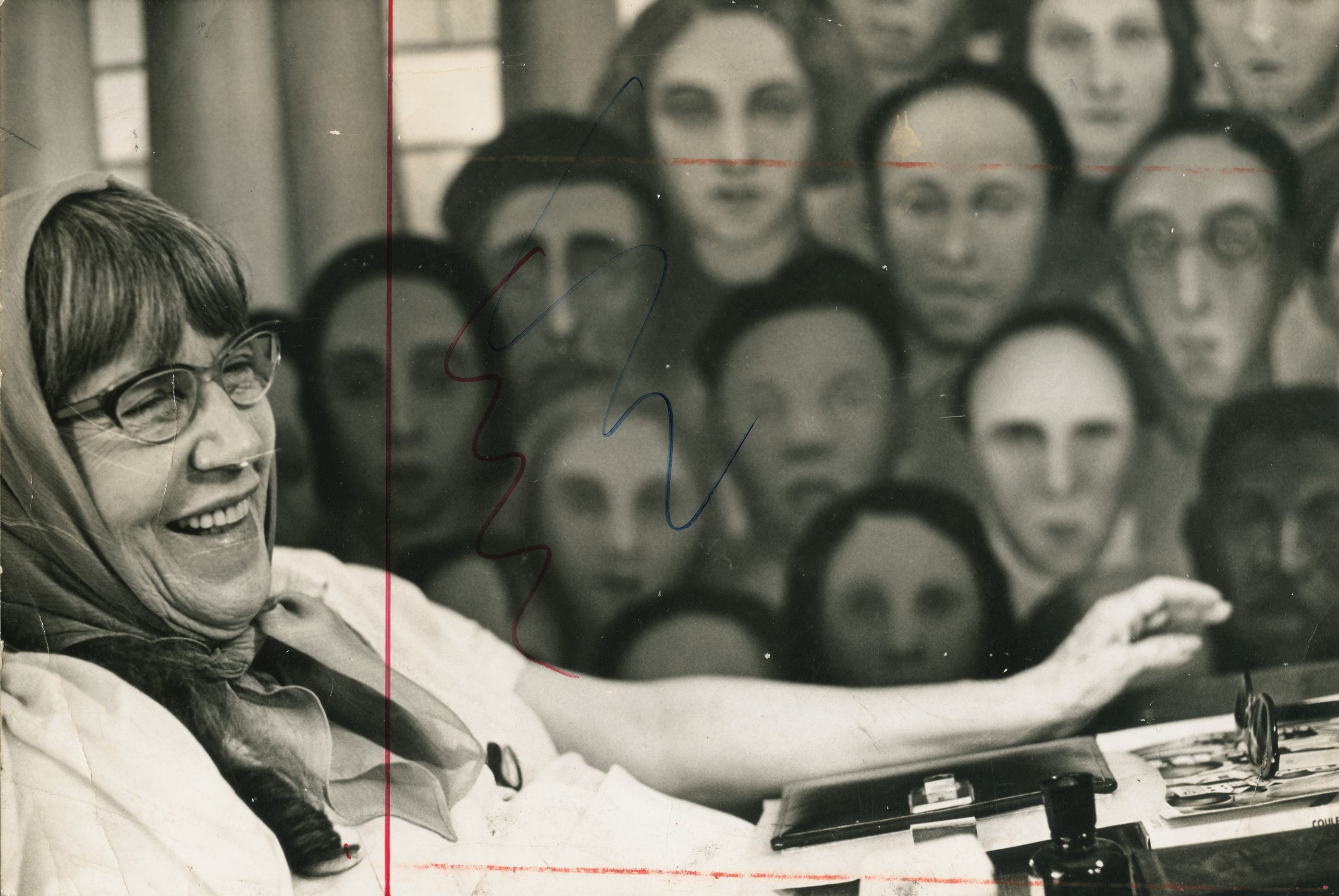 Fotografia do Fundo Correio da Manhã, sob a guarda do Arquivo Nacional.